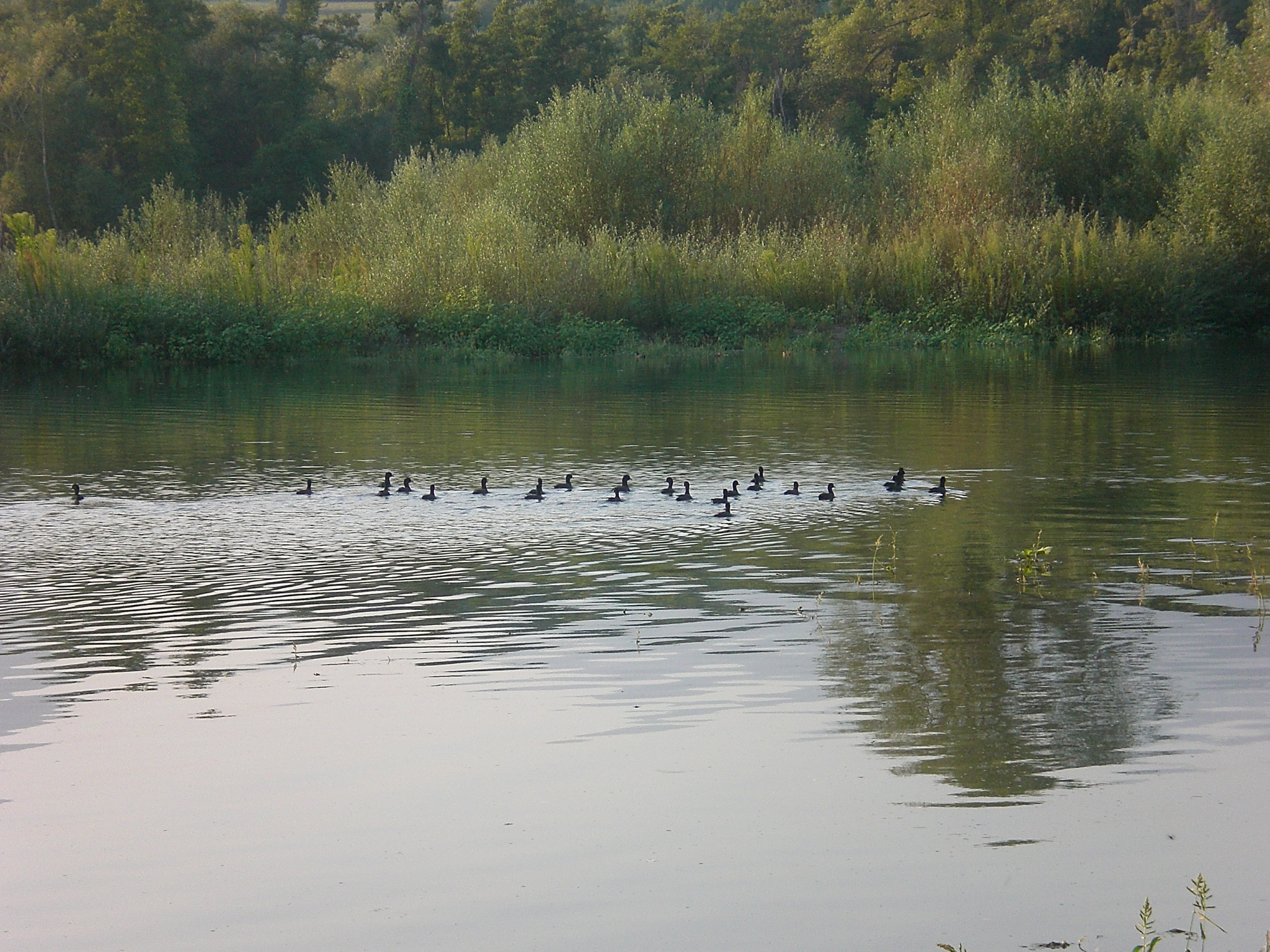 Oasi WWF di Persano This is a photo of a monument which is part of cultural heritage of Italy. The authorisation for taking photos of this object was provided by the World Wide Fund for Nature Italy.